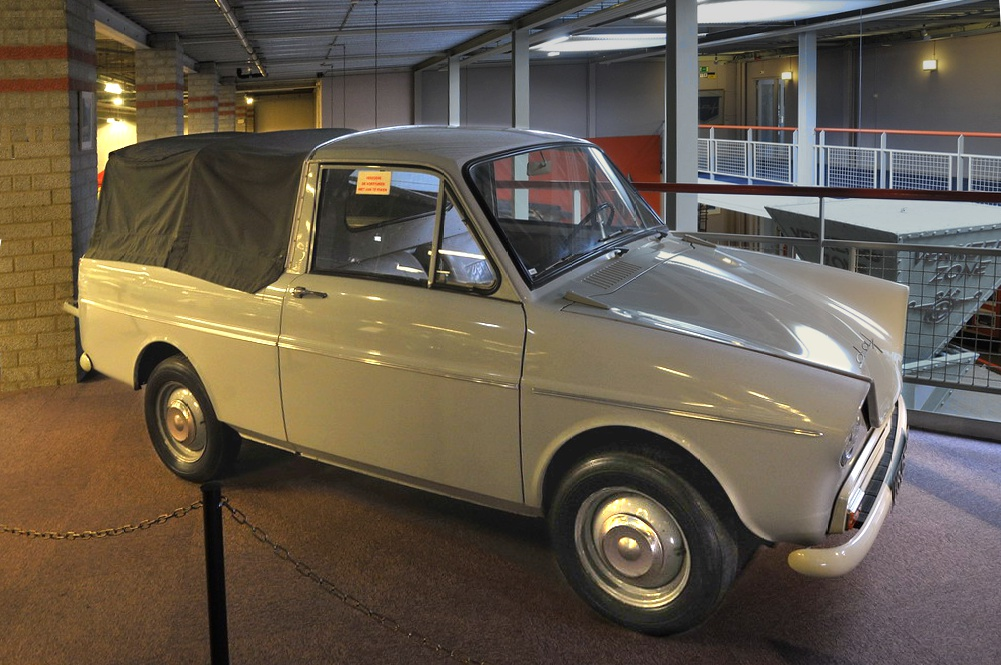 2 cilinder Boxermotor 750cc. Vermogen 30 SAE Pk. Variomatic aandrijving. Totaal geproduceerd 56.200.